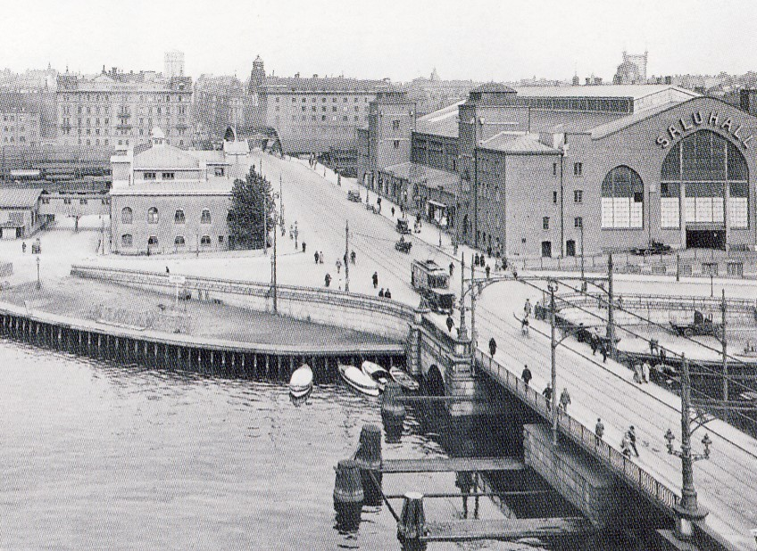 Centralsaluhallen med Kungsbron 1923